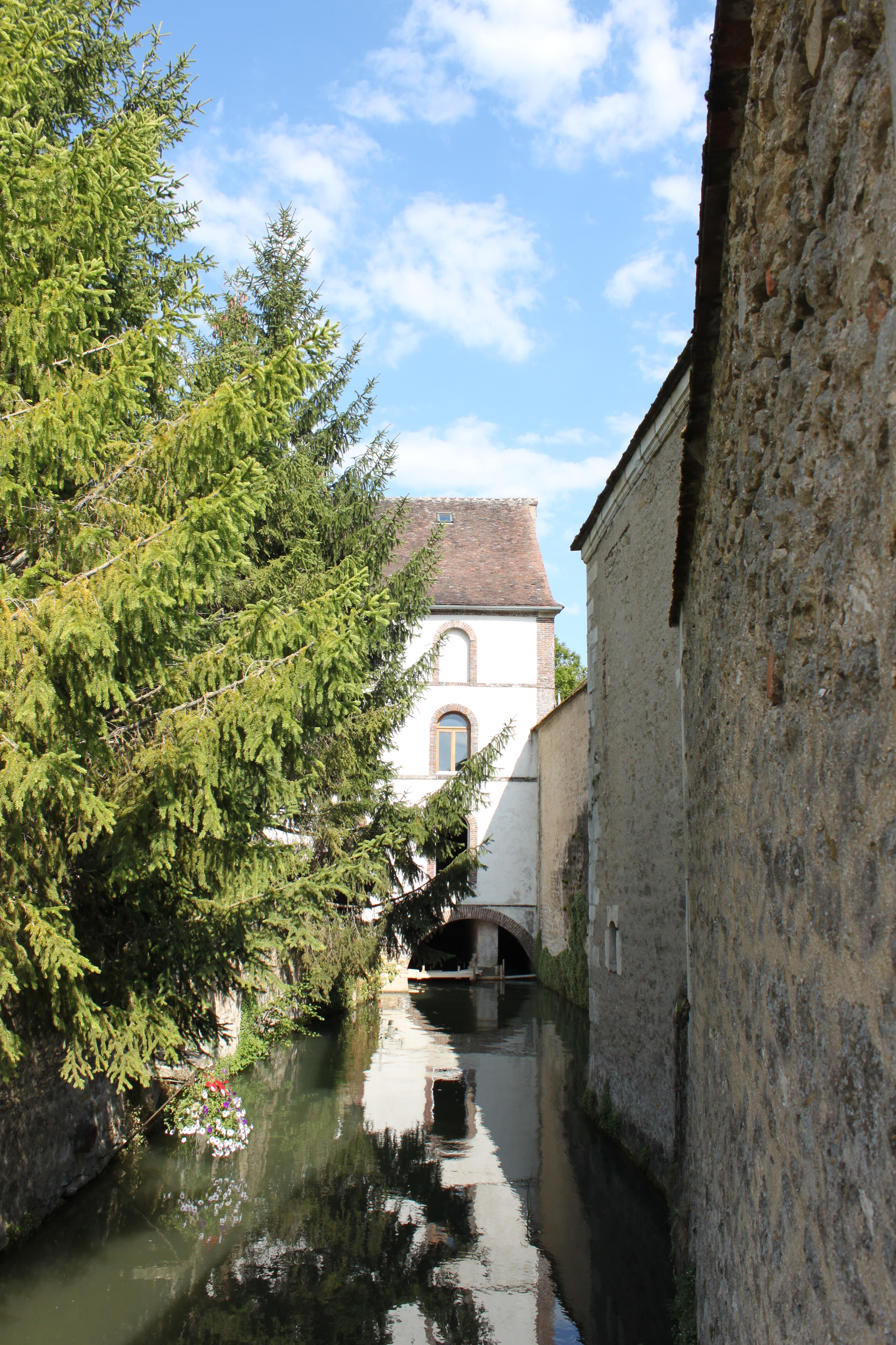 Le Serein, Moulin de Pontigny, Yonne, Bourgogne, France